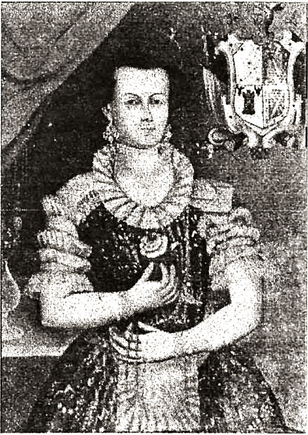 Retrato al óleo expuesto en el Museo de La Paz (Bolivia).